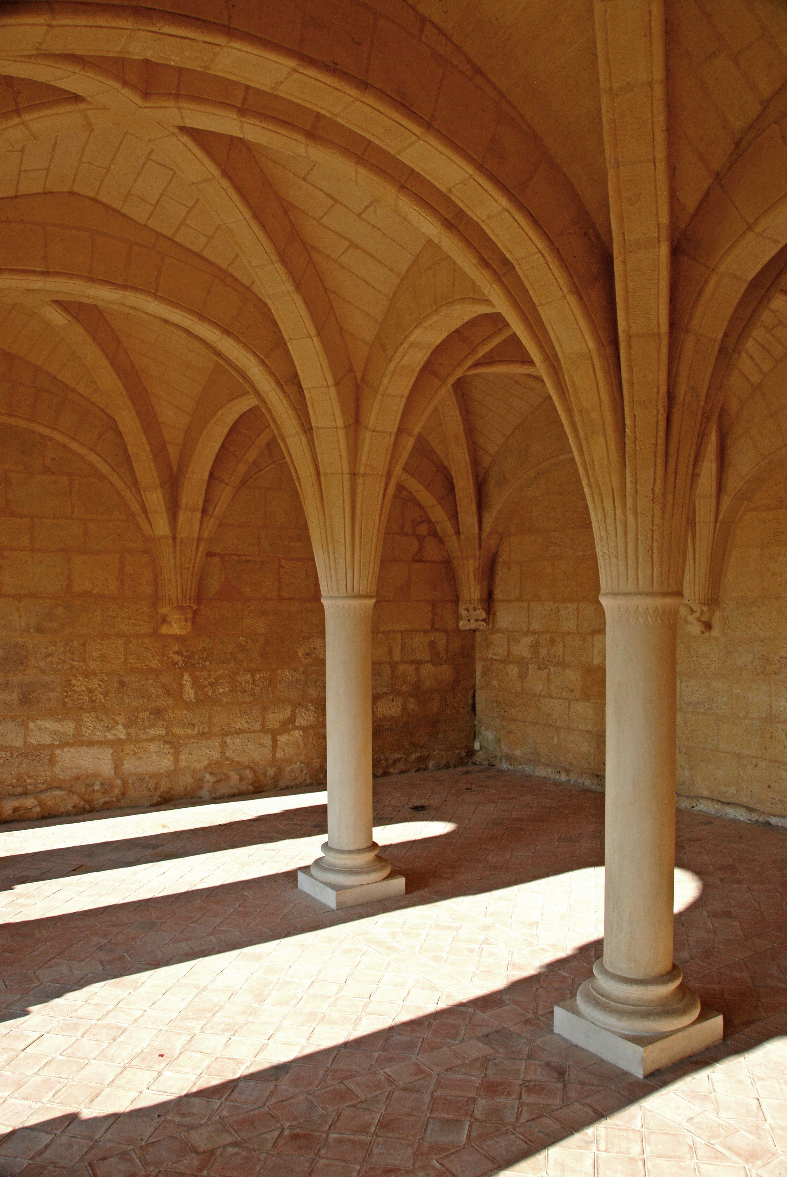 Abtei Trizay, Kapitelsaal, Pfeiler